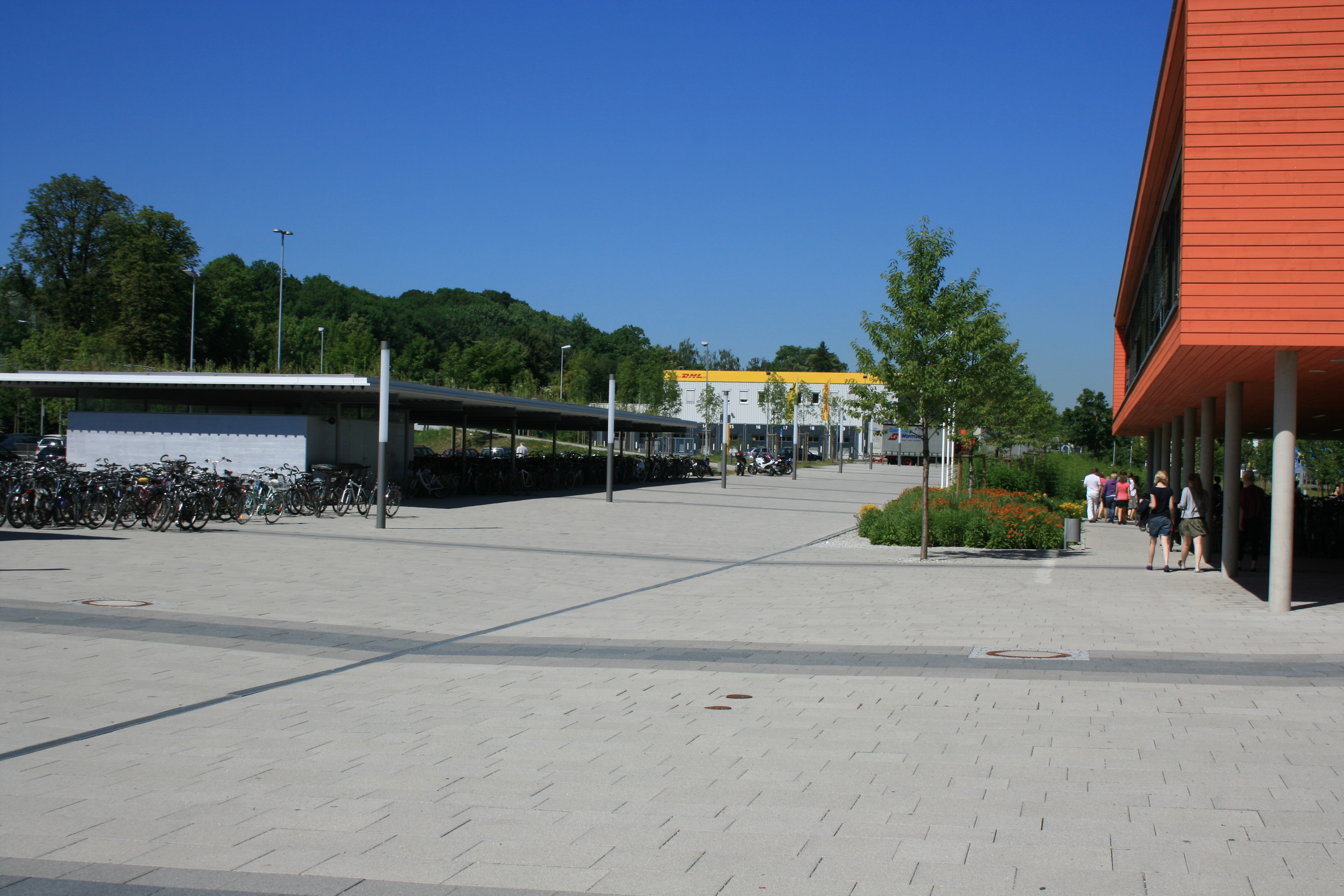 Formatmix bis 60 cm Kantenlänge, Dimensionierung für fußläufige Bereiche und Feuerwehrzufahrt in 10 cm Dicke